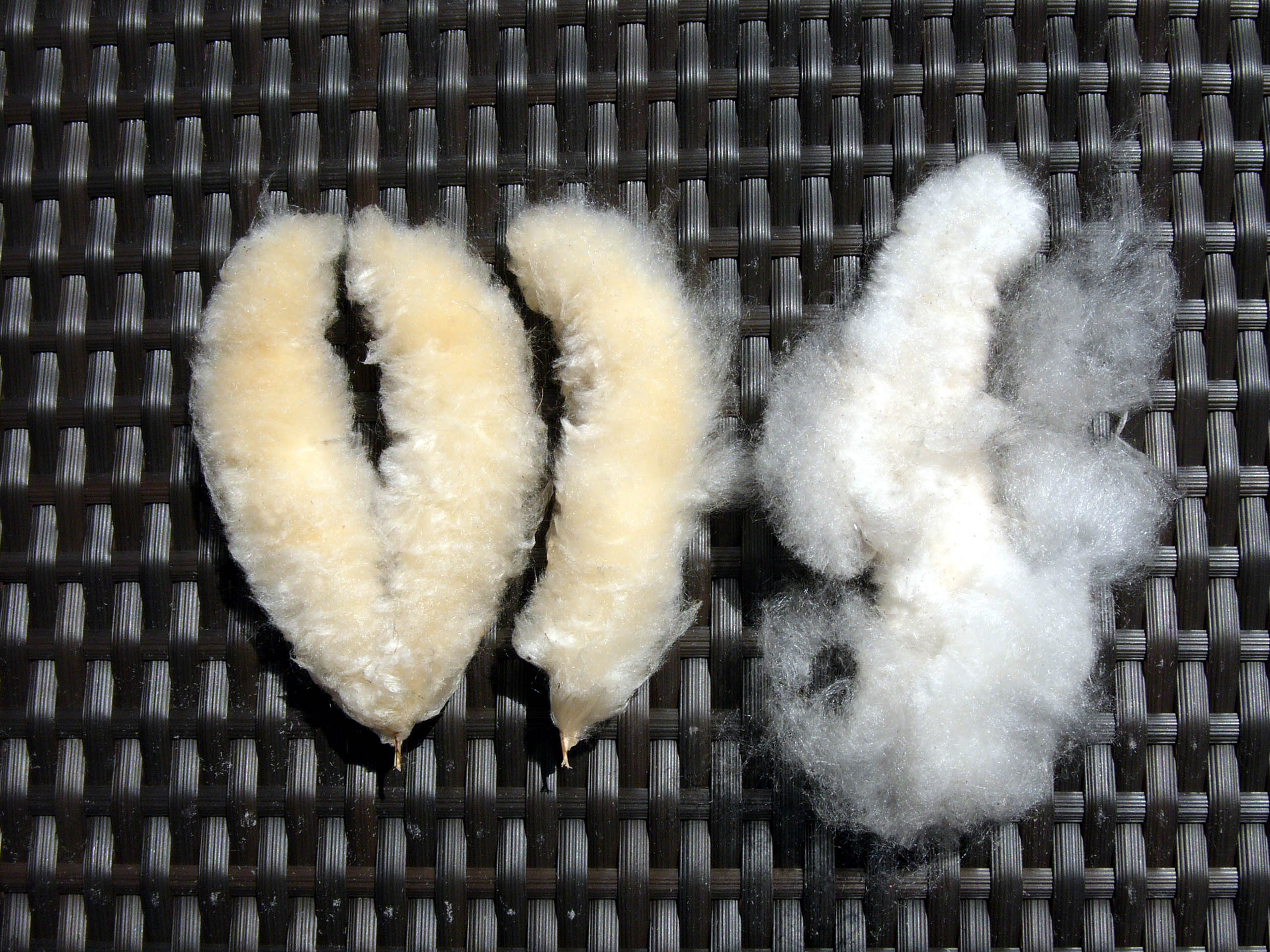 Kapok from Ceiba pentandra, Madeira, Portugal